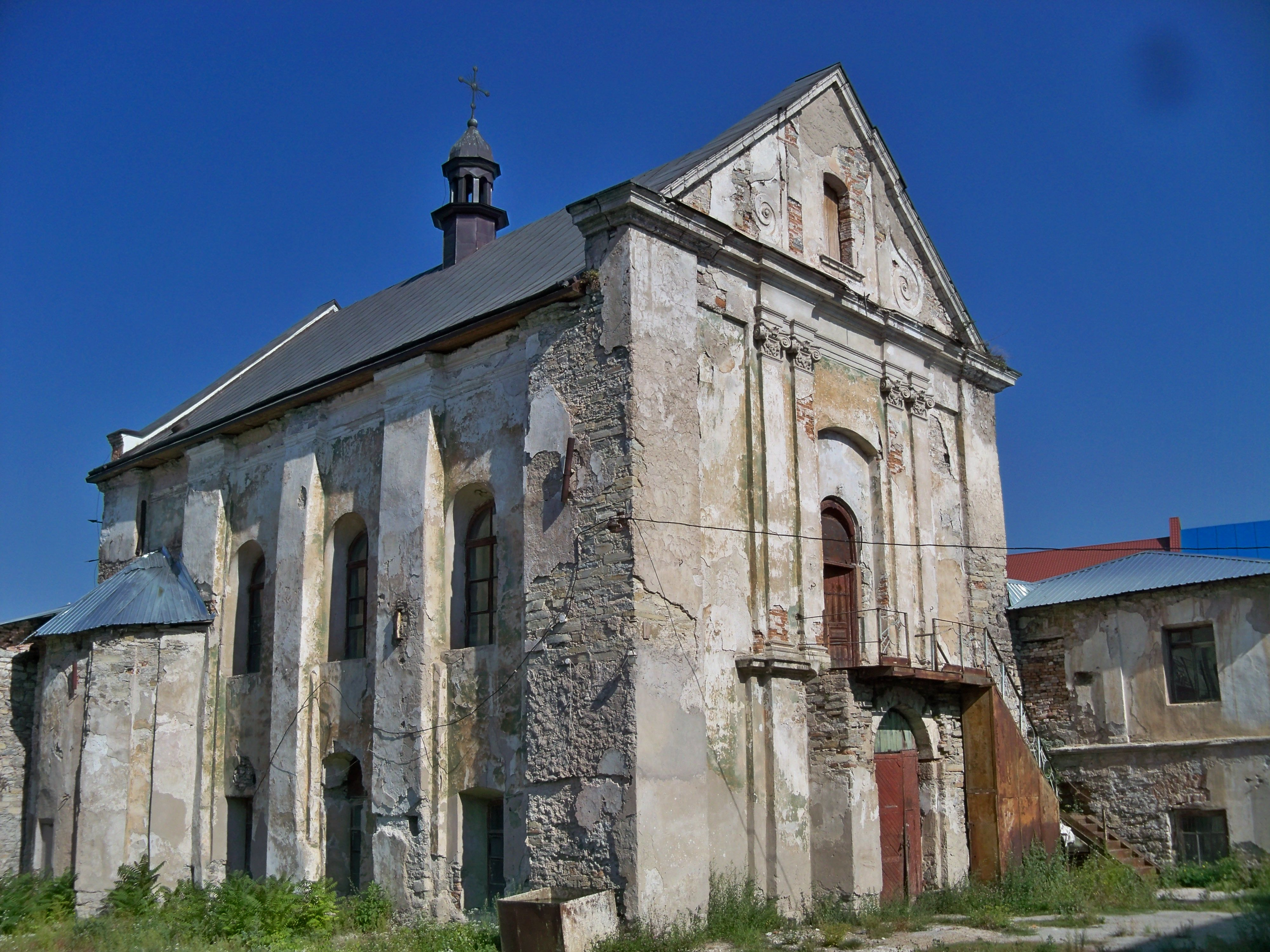 Костел св. Михайла, Кам'янець-Подільський, вул. Францисканська, 12